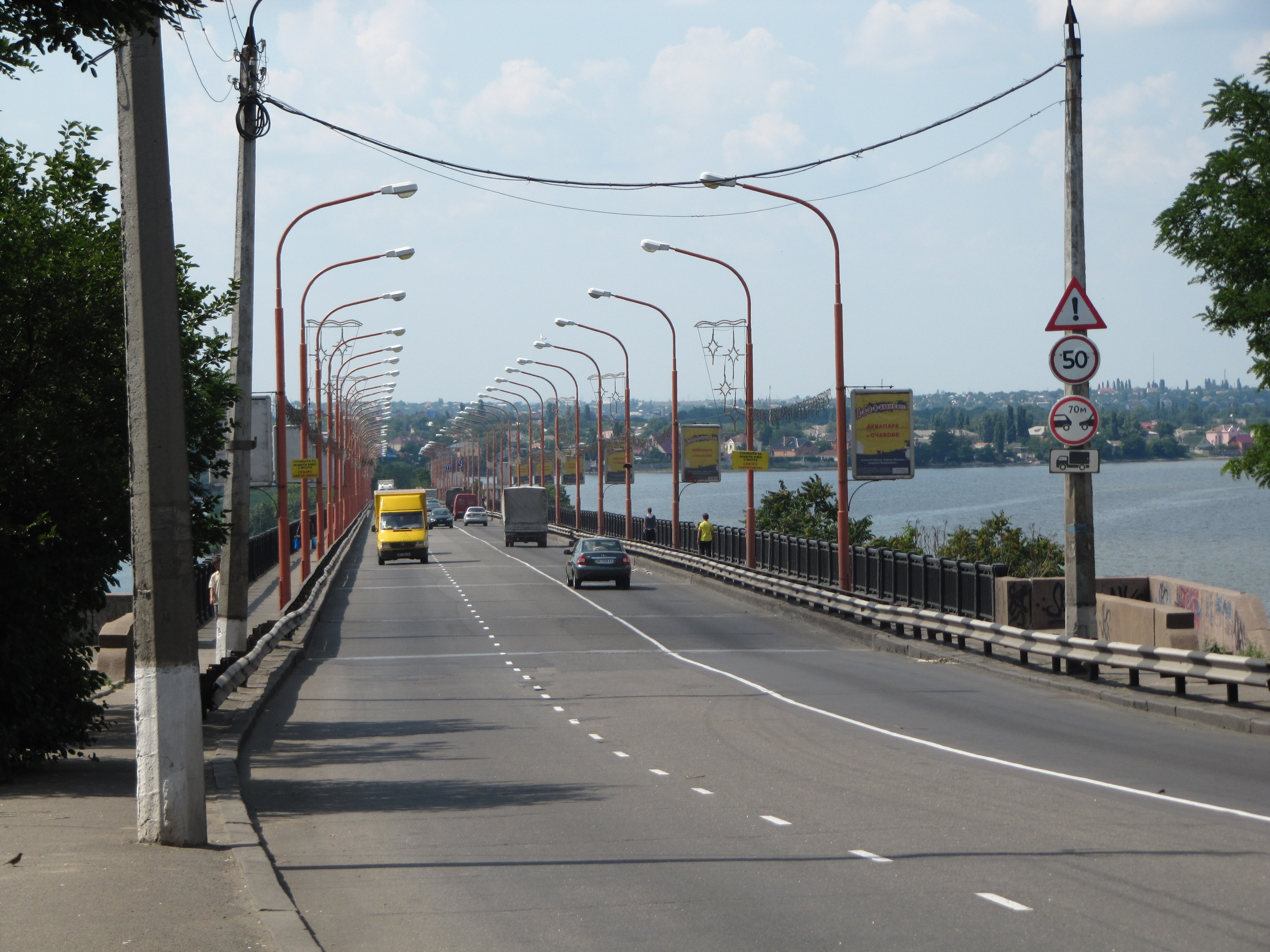 Варварівський міст, виїзд з Миколаєва Миколаївська весна у Вікіпедії